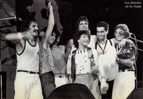 Fotografia del grupo en 1983